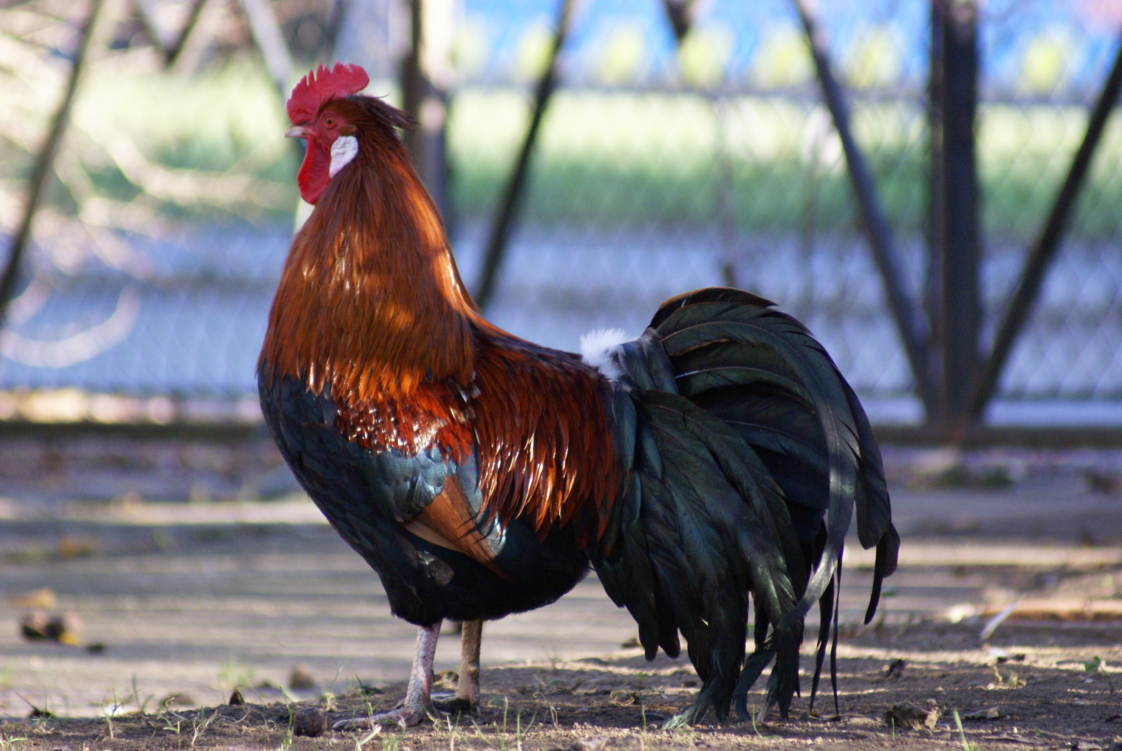 Altsteirer Hahn